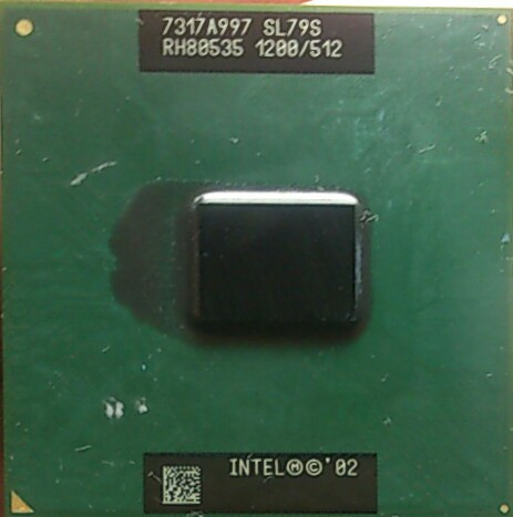 初代CeleronM